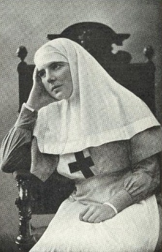 Княгиня Татьяна Фёдоровна Шаховская, ур. баронесса Крузе (1889—после 1916), жена Якова Петровича Шаховского, камер-юнкер Высочайшего двора;в 1914 году ездила на фронт с первым санитарным отрядом Красного Креста имени его Императорского Величества великого князя Николая Николаевича сестрой милосердия.